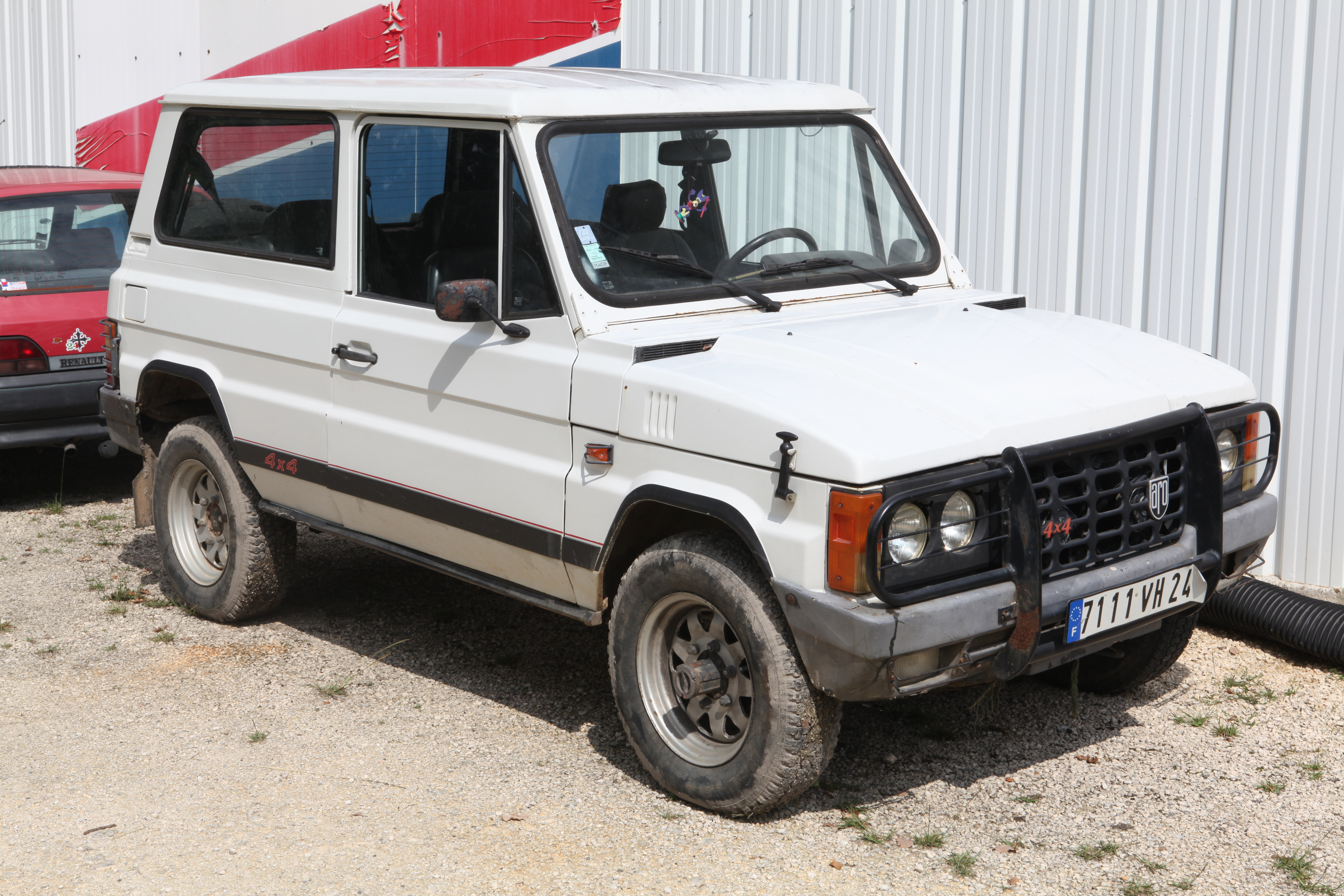 ARO 4 x 4